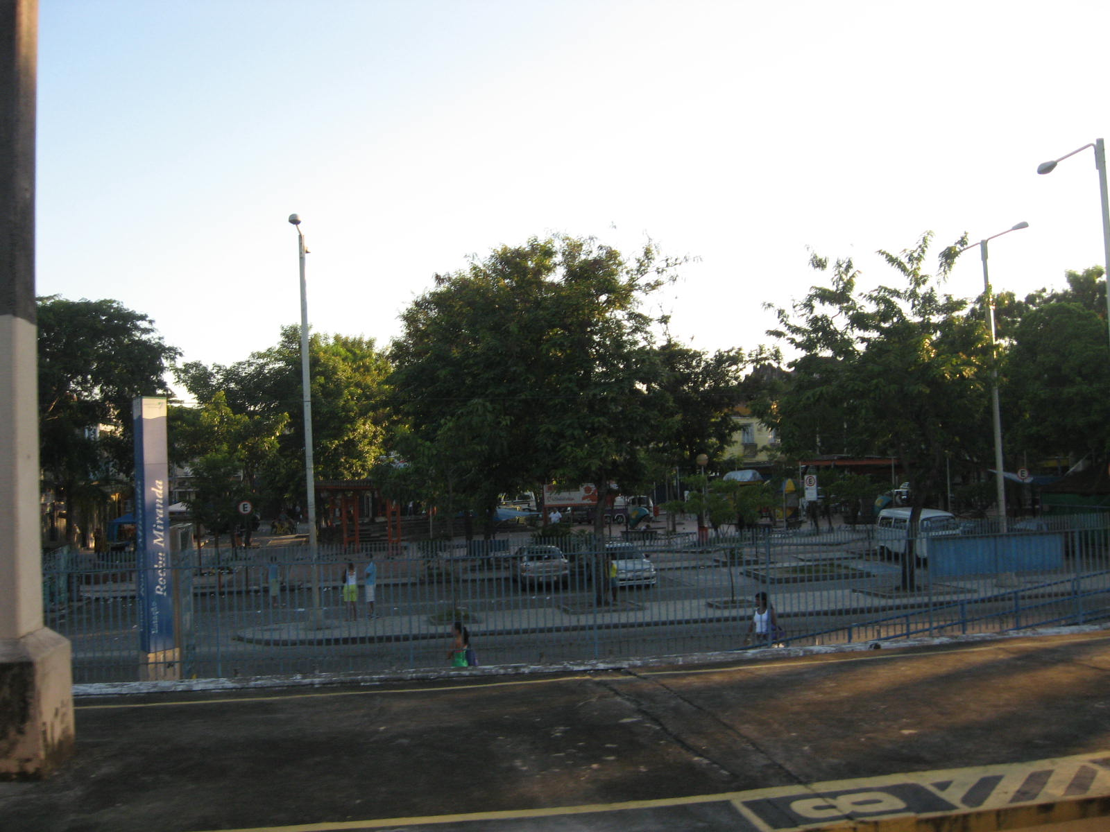 Rocha Miranda, bairro do subúrbio da cidade do Rio de Janeiro.